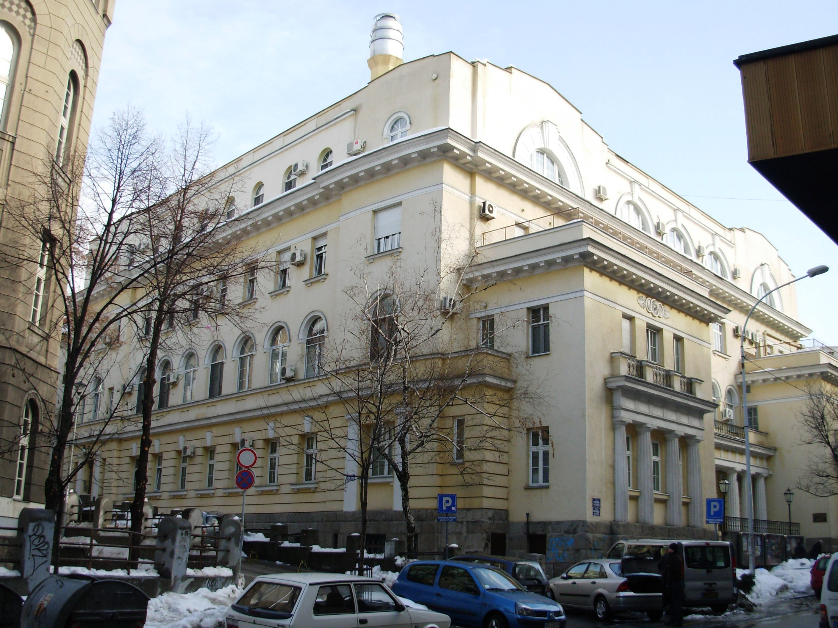 Ruski centar za nauku i kulturu u Beogradu. Slikao Goldfinger Василий Фёдорович Баумгартен (1879–1962) Alternative namesRussian: Василий (Вильгельм) Фёдорович БаумгартенDescription Russian architect Date of birth/death30 October 1879 (17 October 1879 in Julian calendar)13 May 1962Location of birth/deathSaint Petersburg, RussiaBuenos Aires, ArgentinaWork locationSaint Petersburg, Belgrade etc.